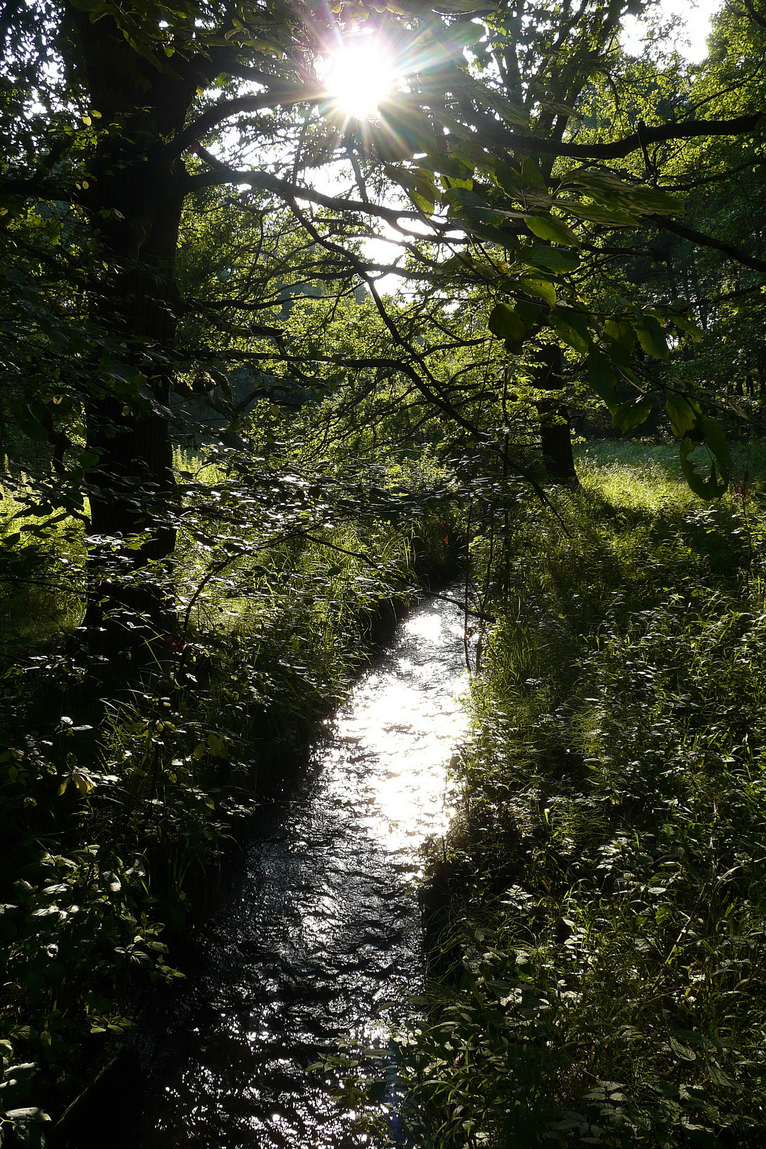 Svatojířský potok odtékající z Ptáckého rybníka